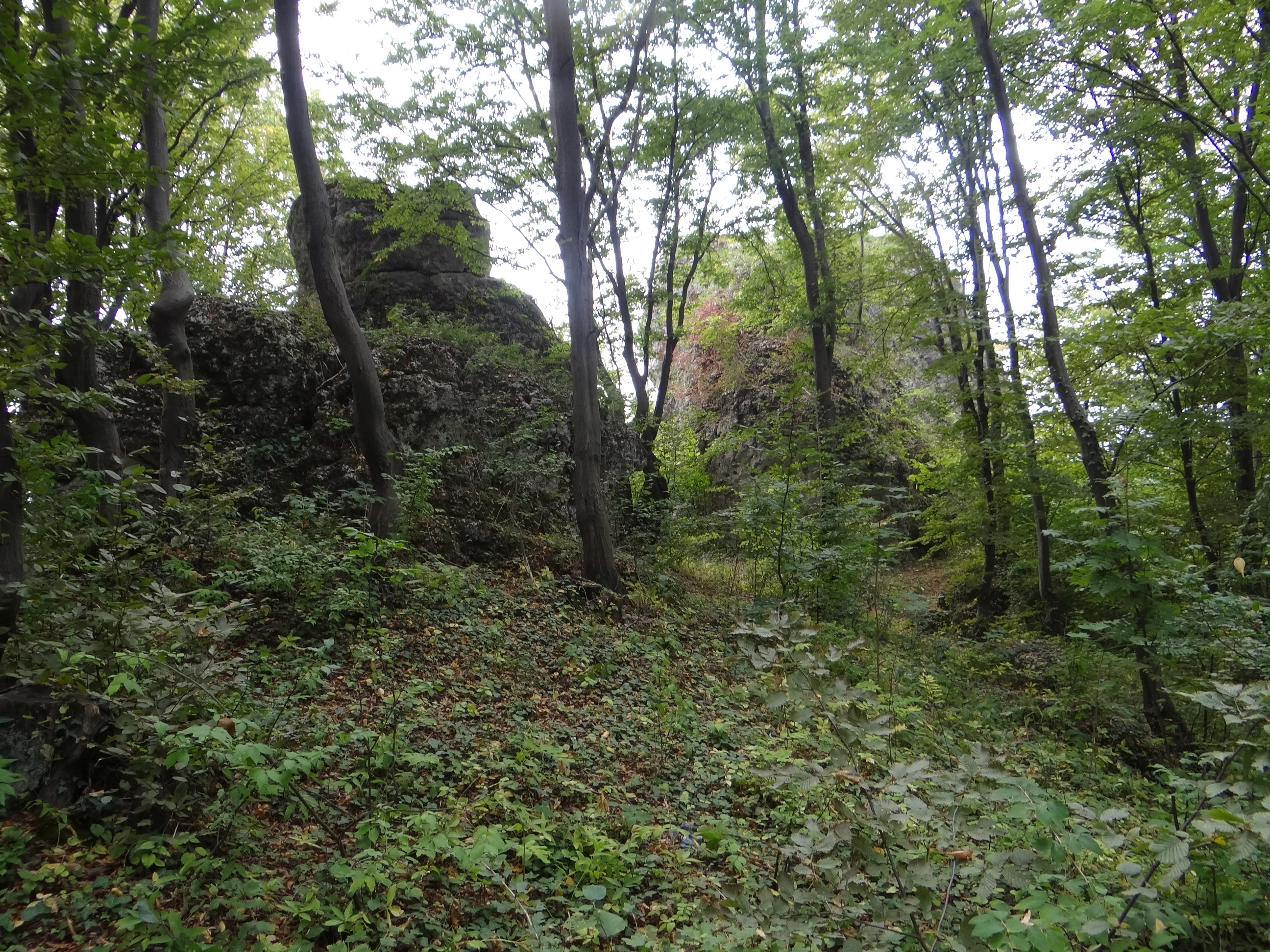 Skała Hyla w Morsku